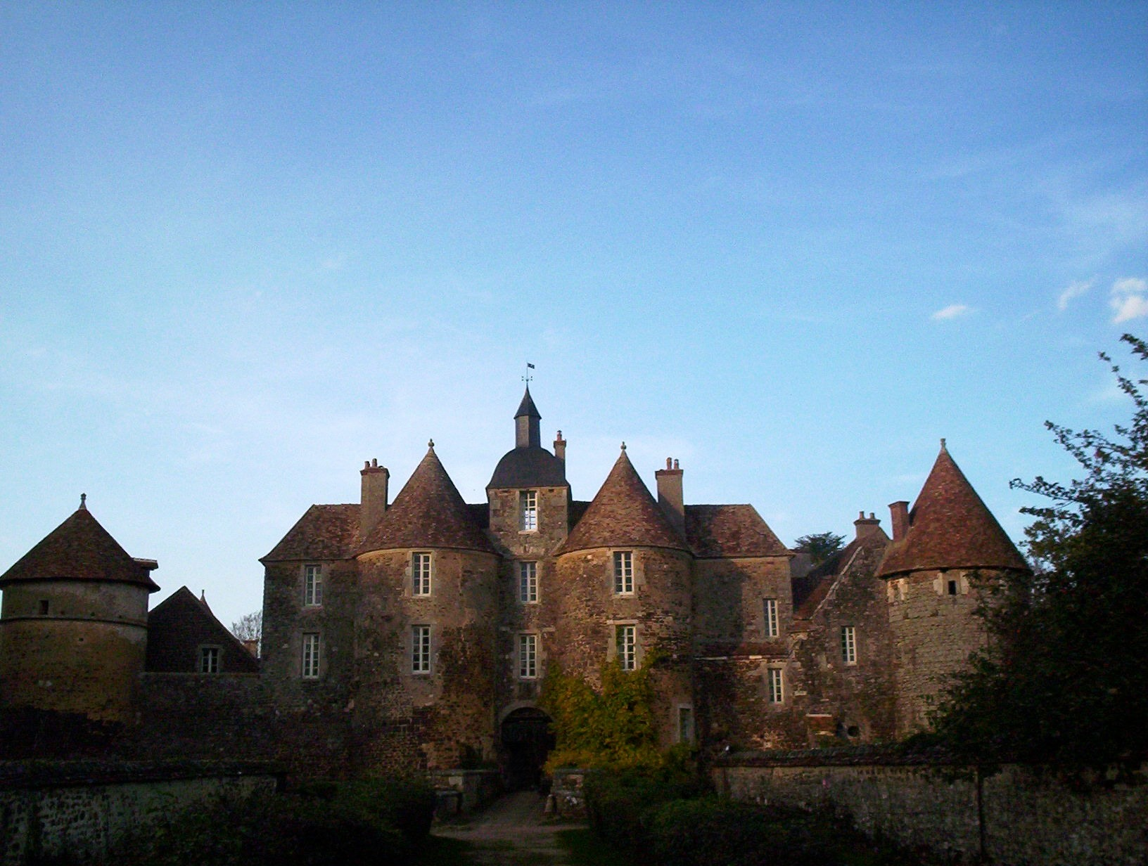 Château de Ratilly du XIIIe siècle - Treigny dans le département de l'Yonne(89)